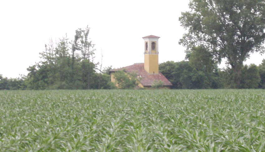 Il Santuario della Madonna della Fontana, a Camairago (LO) Italia